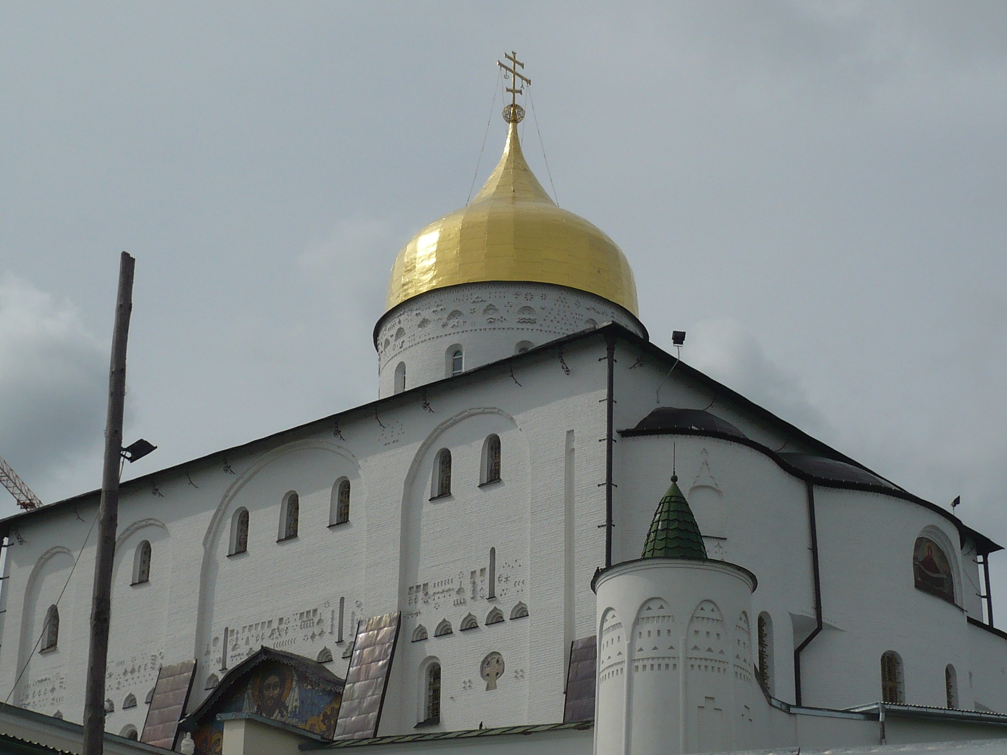 Ławra Poczajowska